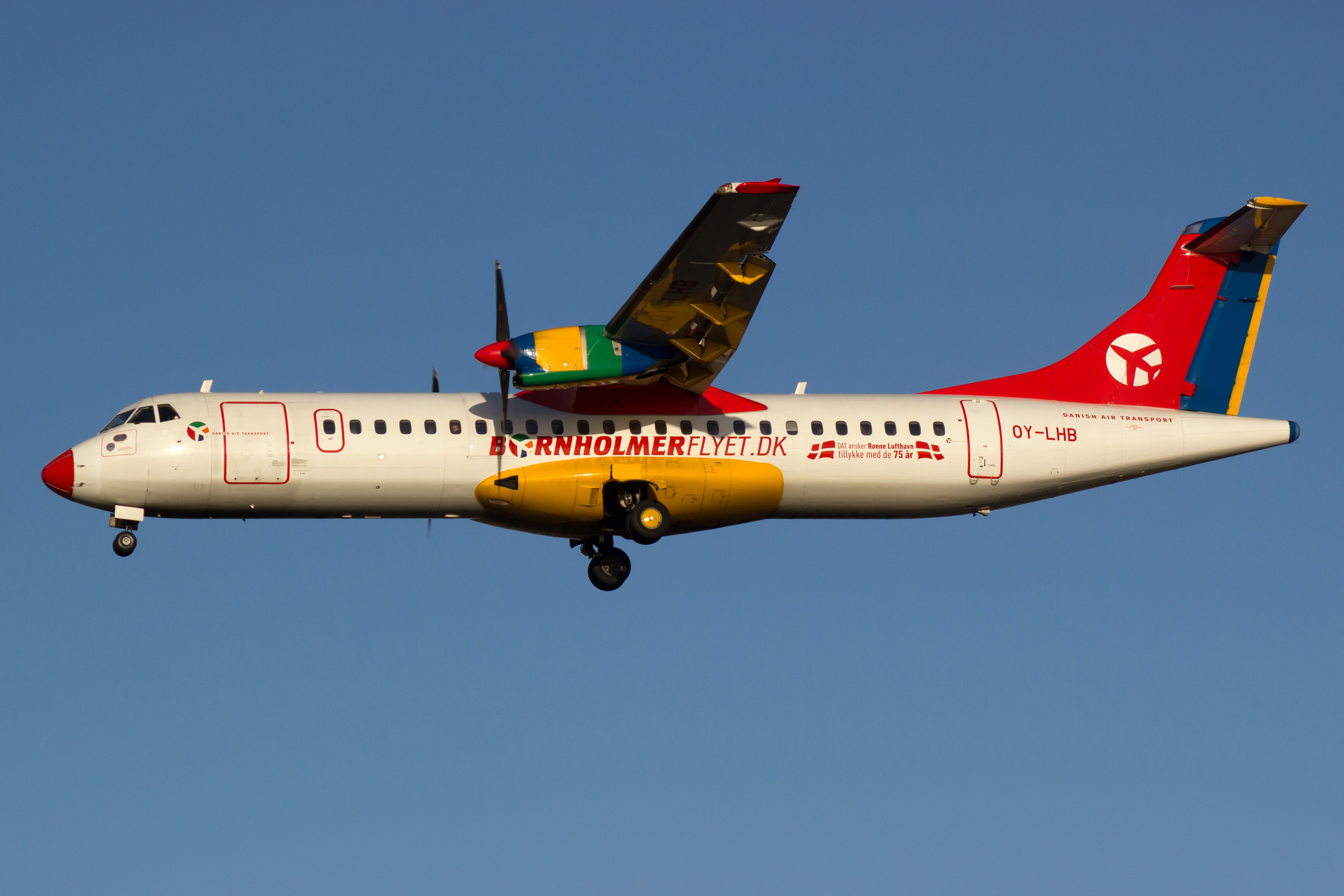 ATR 72 de Danish Air Transport aterrando no aeroporto de Copenhague.